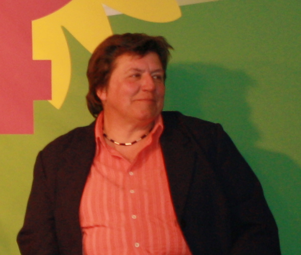 Frauenforum Bündnis 90/Die Grünen Nordrhein-Westfalen 2011